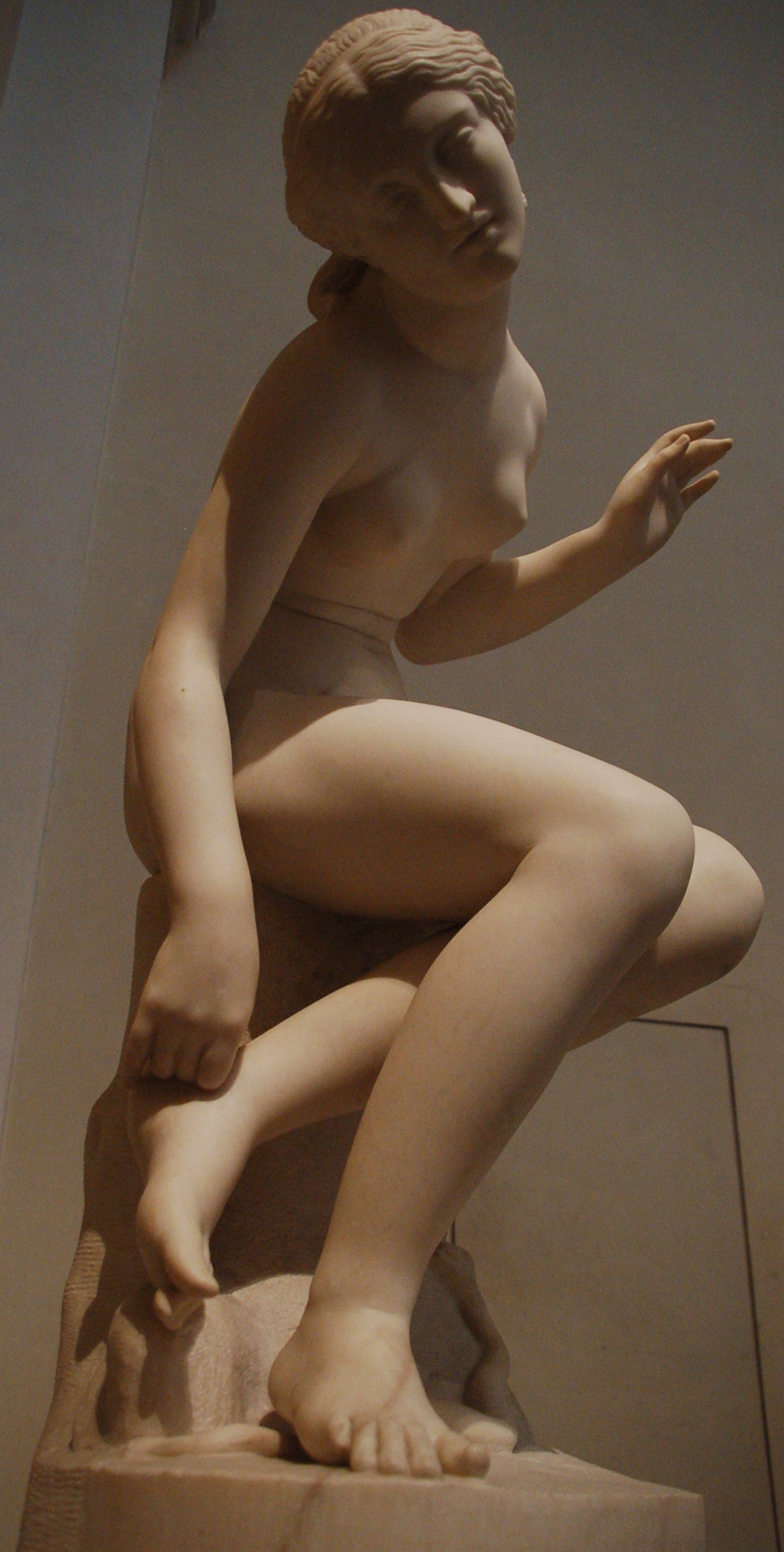 Musée des Beaux-Arts de Lyon Jean-François Legendre-Héral (Montpellier, 1795-Marcilly (Seine-et-Marne), 1851) Marbre Don de l'artiste, vers 1825 Inventaire H-788